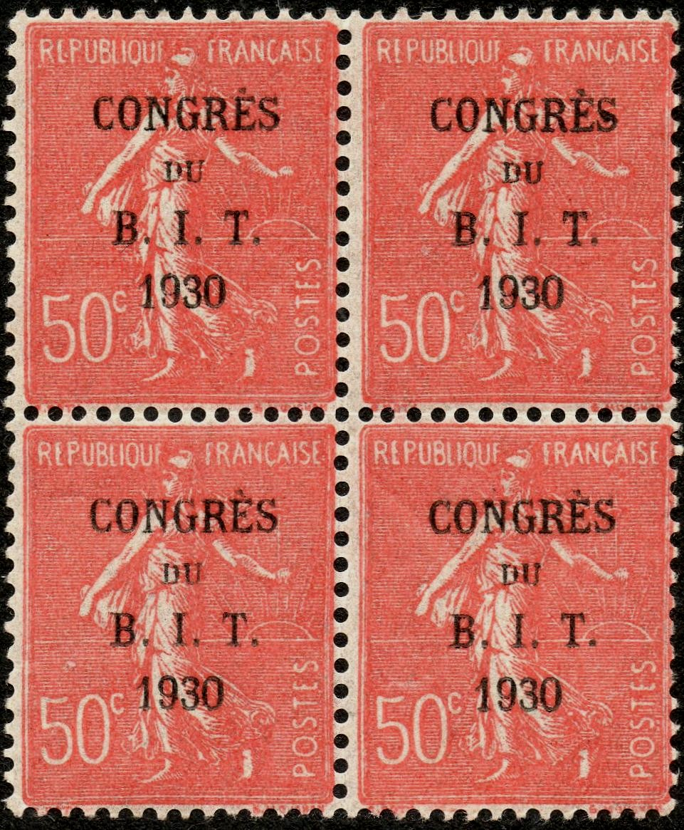 Timbre-poste français émis à l'occasion du congrès du Bureau international du travail 1930